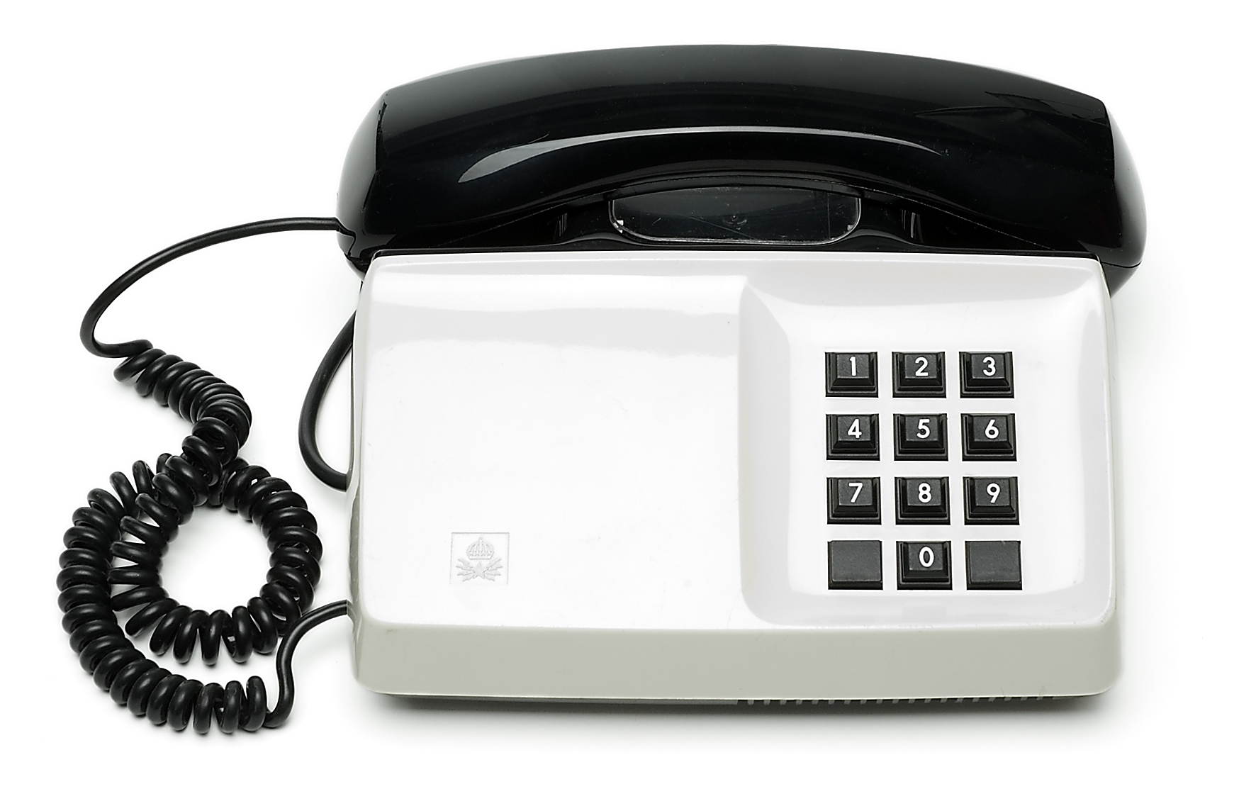 Telefonapparat Ericsson Diavox för AT-system, huvudapparat, anknytningsapparat till abonnentväxel och sidoapparat. Bordsmodell av plast med vit kåpa, svart mikrotelefon, knappsats med tio knappar för impulsval, högohmig reglerbar ringklocka, elektretmikrofon och elektronisk talkrets med automatisk dämpningskompensering.